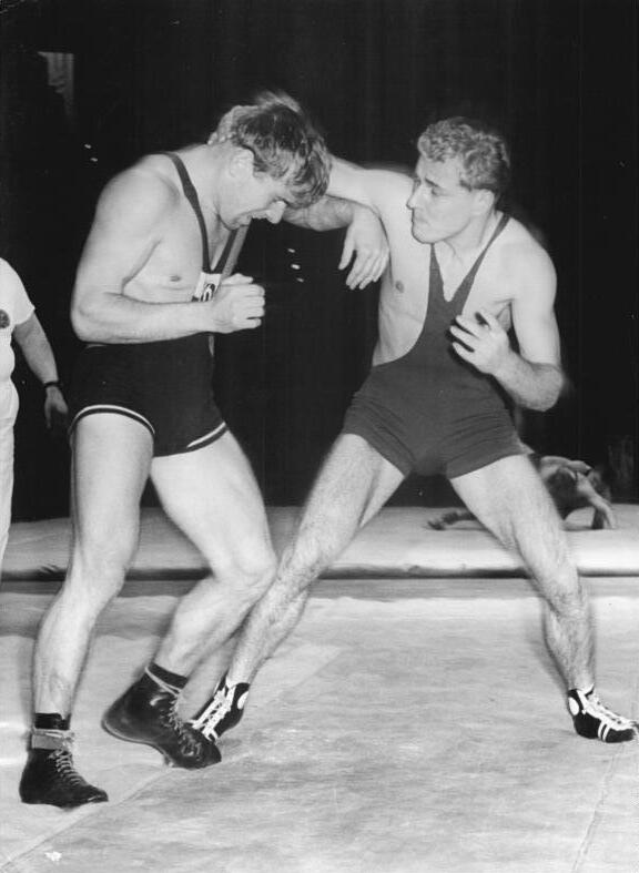 Tischendorf, Rübekeil Zentralbild Dressel 27.10.57 Wen-L Ring- und Boxveranstaltung in der Deutschen Sporthalle Am 26.10.1957 fand in der Deutschen Sporthalle in Berlin eine Ring- und Boxveranstaltung statt. Im Ringen standen sich die Mannschaften von Motor Jena und Dynamo Luckenwalde und im Boxen die Junioren Berlins und Pognan gegenüber. UBz: Im Weltergewicht standen sich der Meister des Sports Tischendorf (Motor Jena) und Rübekeil (Dynamo Luckenwalde) gegenüber. Sieger nach Punkten wurde Tischendorf (rechts).